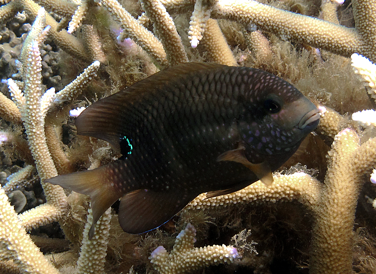 Un poisson fermier (Stegastes punctatus) à la Réunion.